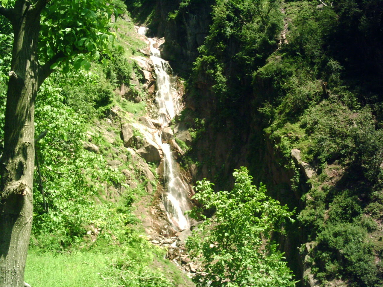 Chamran ala Katha Fall, Kanshian